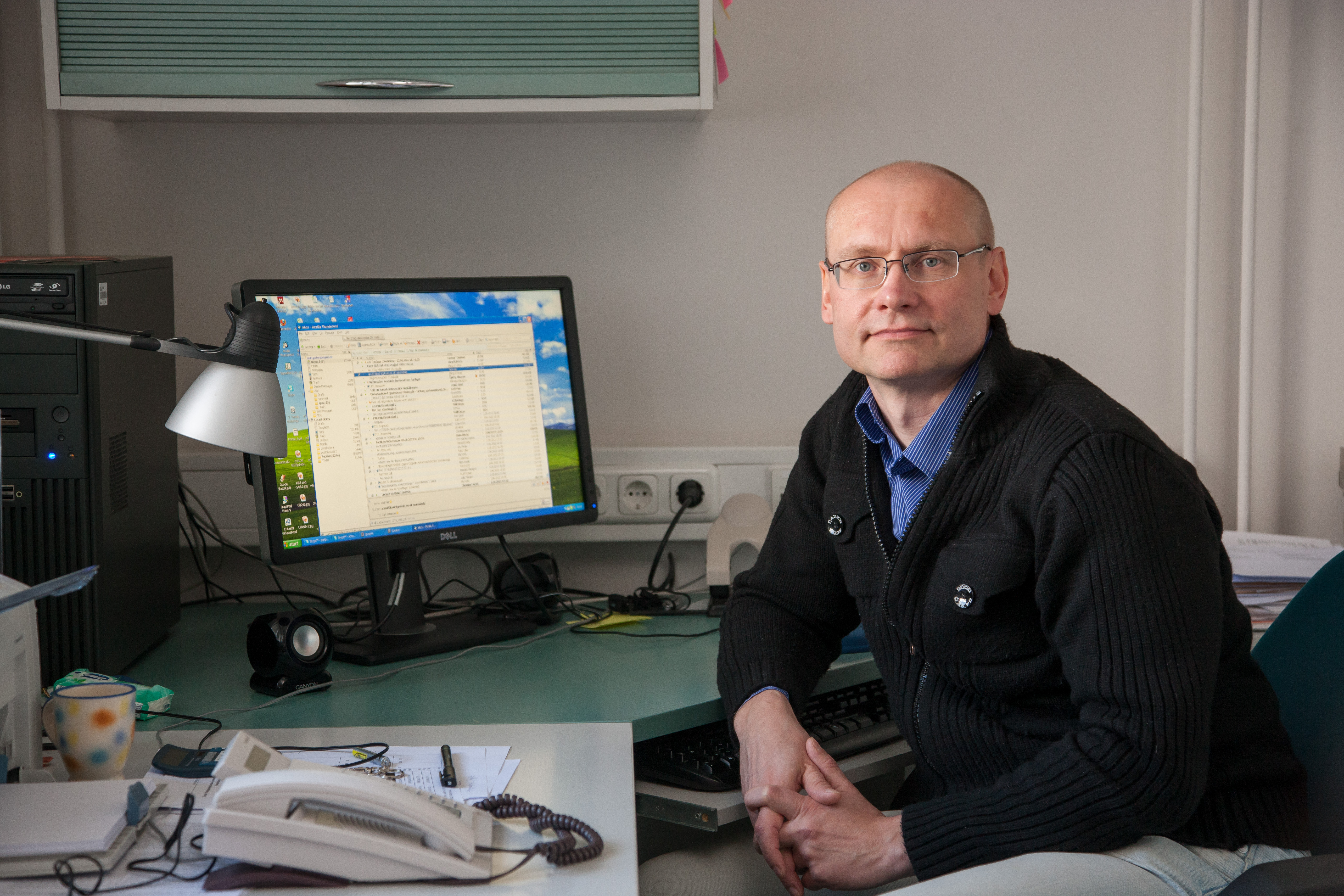 TÜ arstiteaduskonna üld- ja molekulaarpatoloogia instituut 4. juunil 2012. Molekulaarpatoloogia uurimisgrupp. Uurija-professor Pärt Peterson.